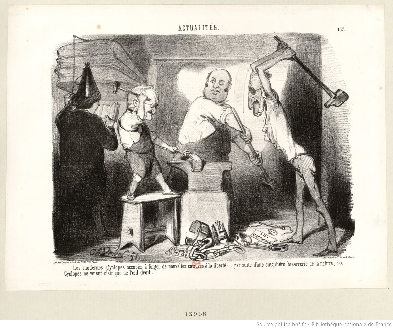 Thiers, Adolphe (1797-1877) France -- 1848-1852 (2e République)